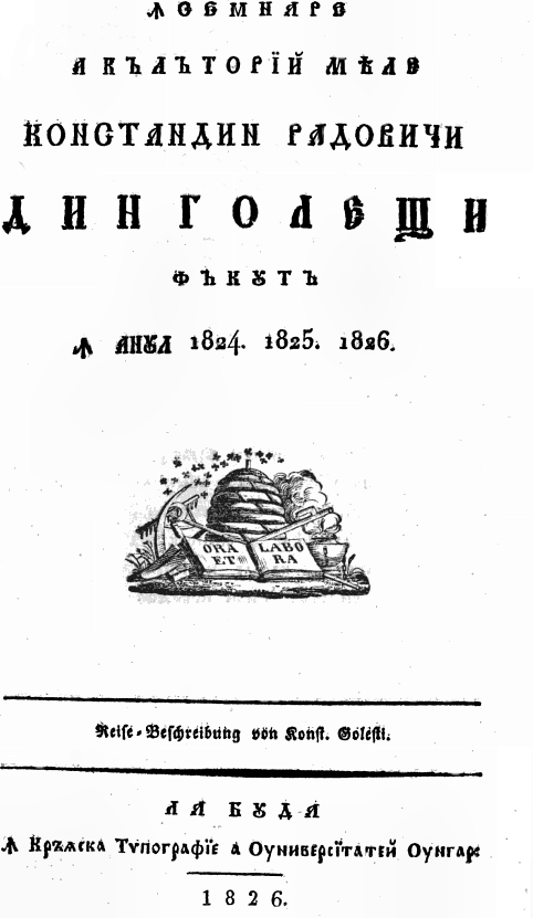 Deckbblatt von Dinicu Golescus Reisebeschreibungen 1826 TranscriptionTransliterationꙞСЄМНАРЄ А КЪΛЪТОРЇЙ МѢΛЄ КОНСТАНДИН РАДОВИЧИ ДИН ГОΛЄЩИ ФЪКꙊТЪ Ꙟ АНꙊΛ 1824. 1825. 1826. ORA ET LABORA Reiſe-Beſchreibung von Konſt. Goleſti. ΛА БꙊДА Ꙟ Кръѧска Тѵпoграфїє а Ѹнивєрсїтатєй Ѹнгарє 1826.ÎNSEMNARE A CĂLĂTORÏĬ MEALE CONSTANDIN RADOVICI DIN GOLEȘTI FĂCUTĂ ÎN ANUL 1824. 1825. 1826. ORA ET LABORA Reisebeschreibung von Konst. Golesti. LA BUDA În Crăiasca Tipografïe a Universïtateĭ Ungare 1826.